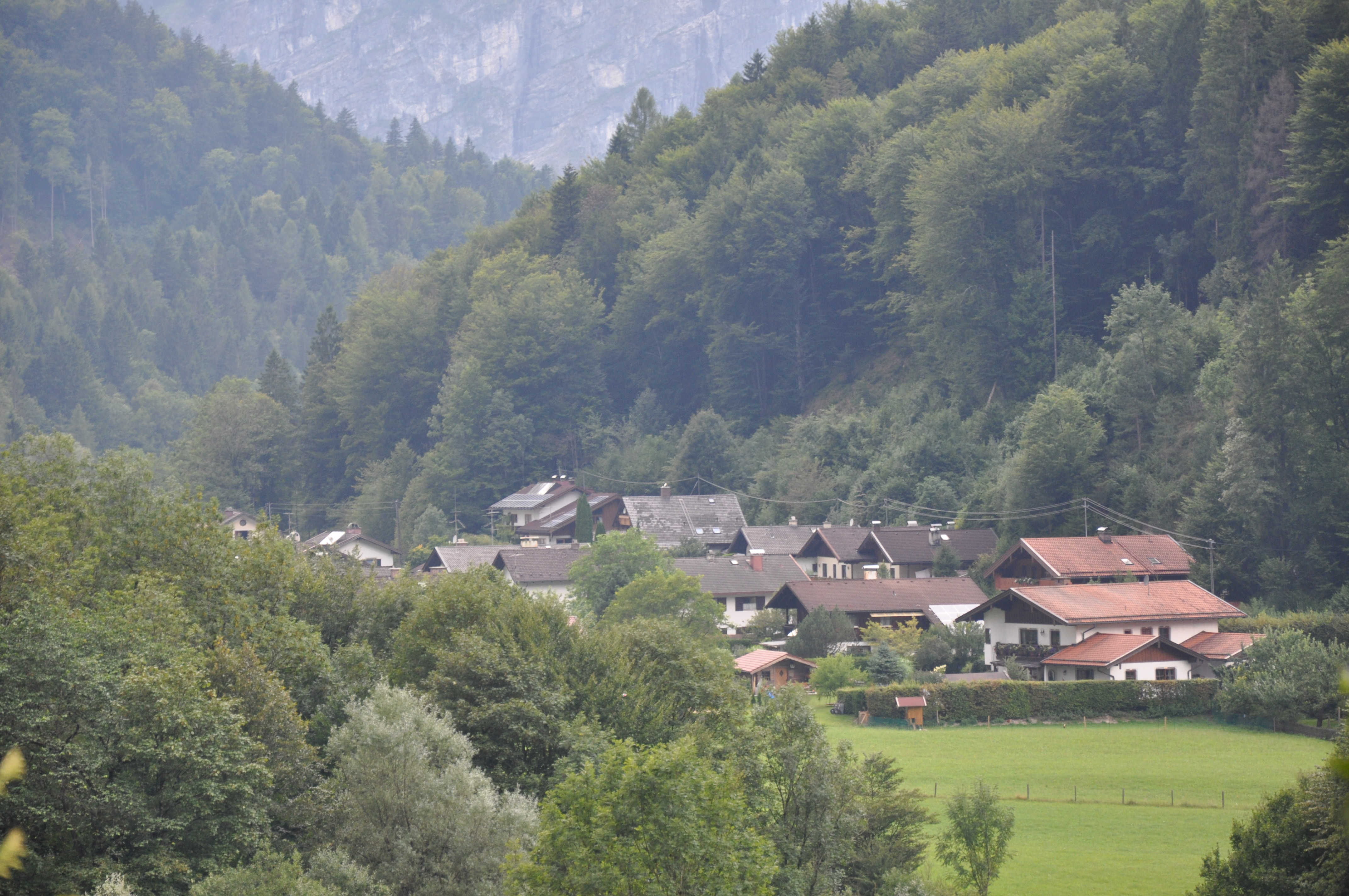 Großteil des Schneizlreuther Ortsteil Fronau